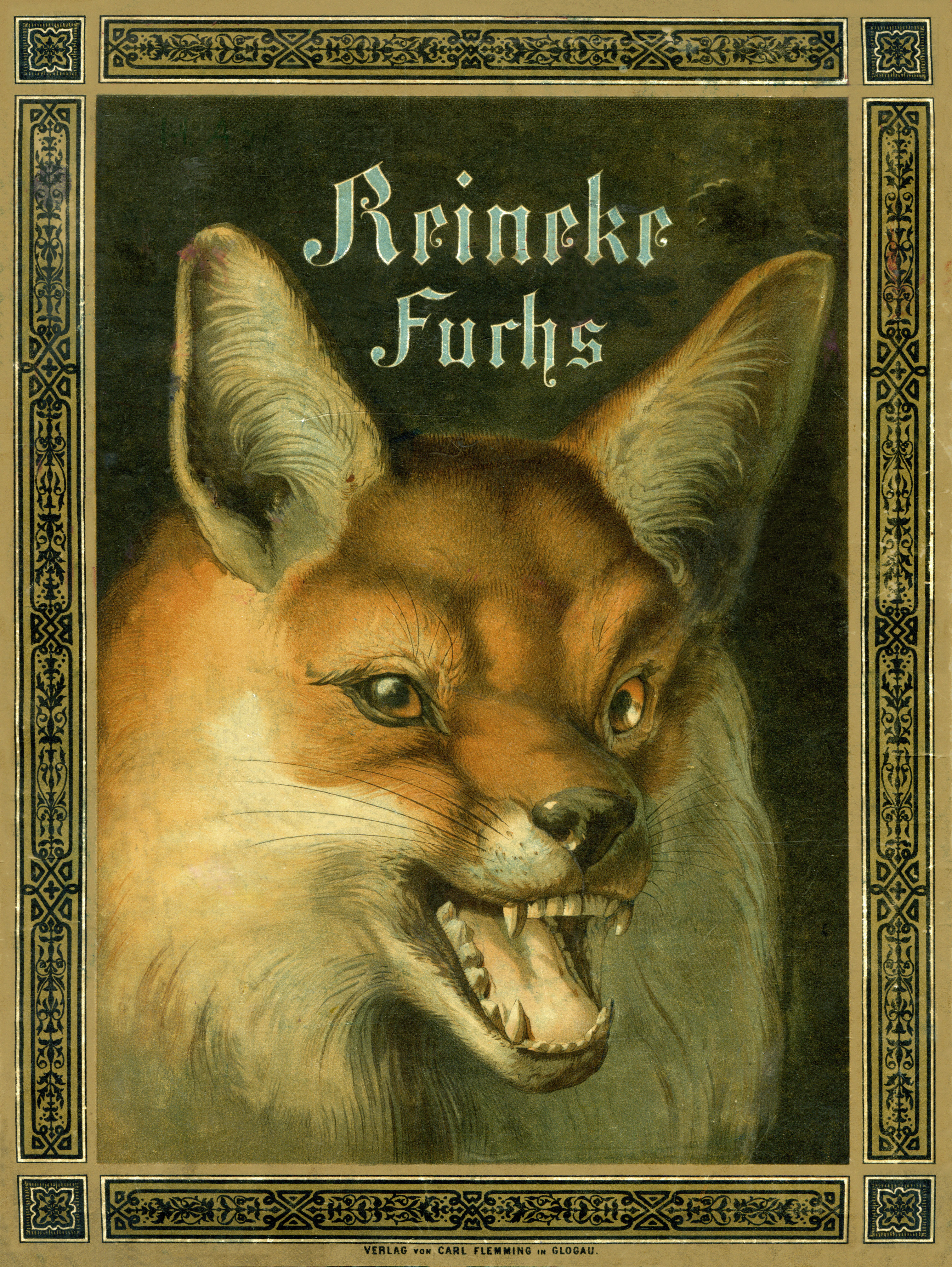 Titel des Buches „Reineke Fuchs“, Ein heiteres Kinderbuch